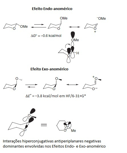 Representação dos Efeitos Exo- e Endo-anoméricos